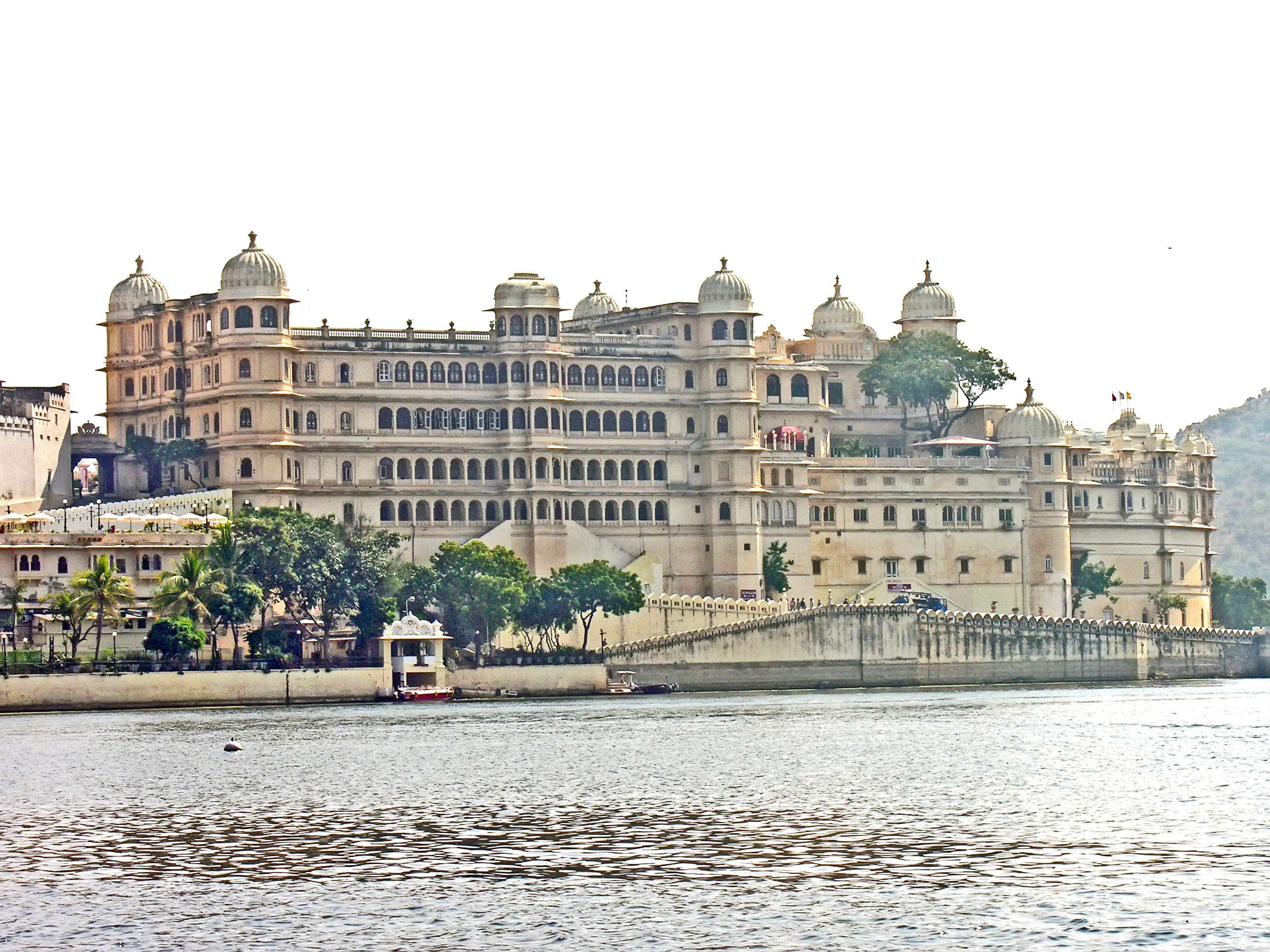 India-6968